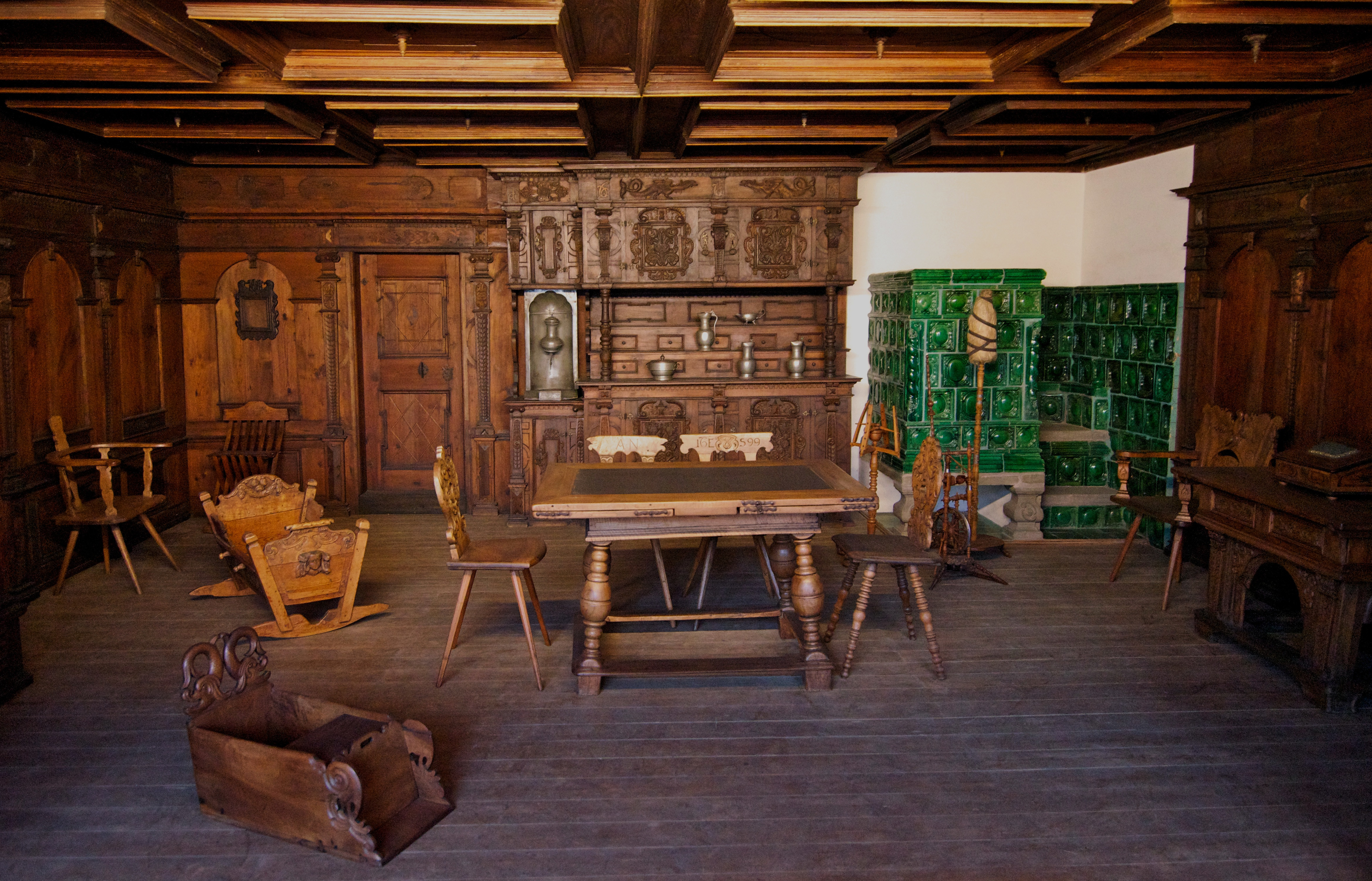 Stube aus dem Thurgau/Nordostschweiz, 1666 (BA4238) Germanisches Nationalmuseum Nürnberg